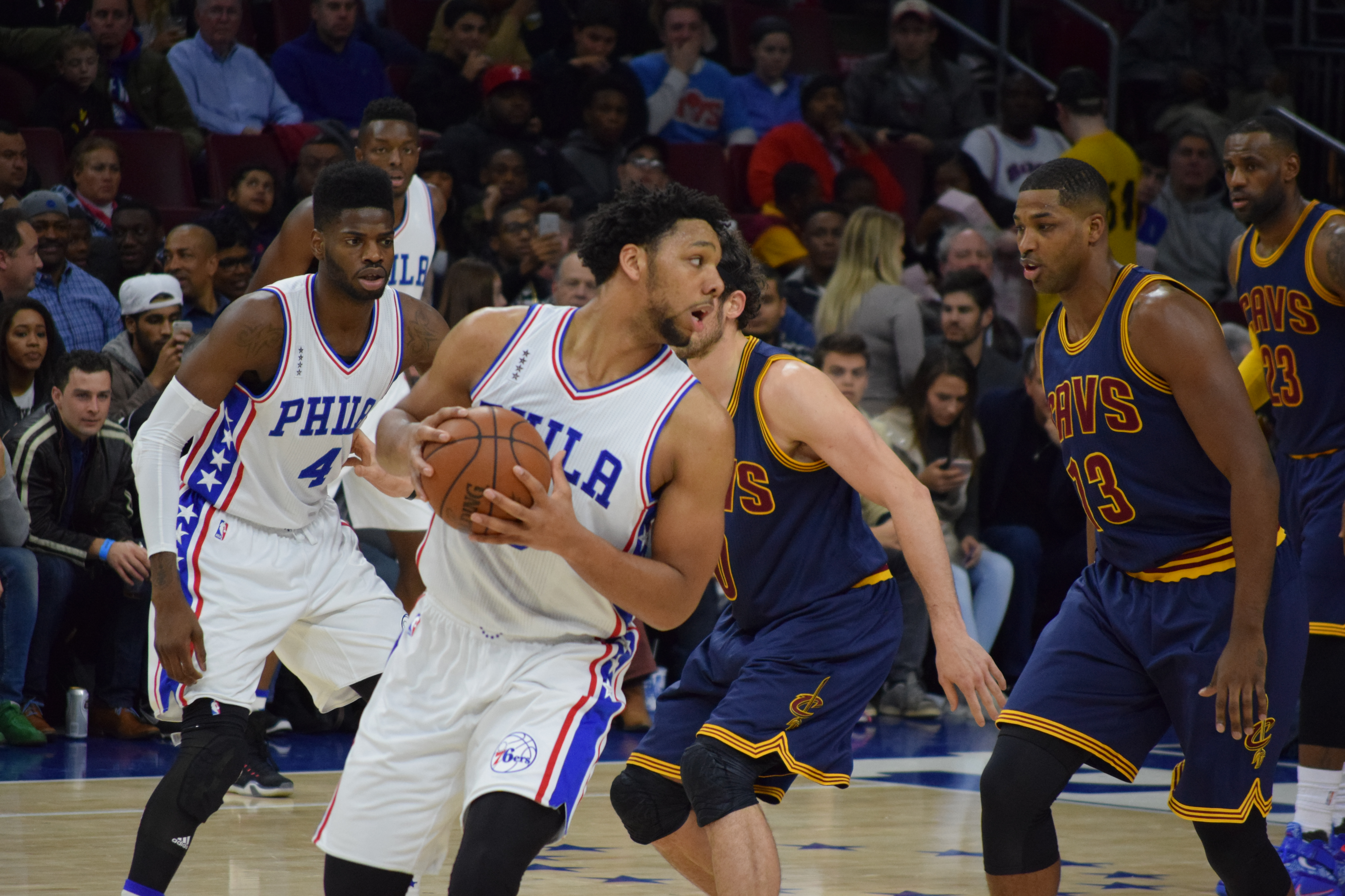 Jahlil Okafor